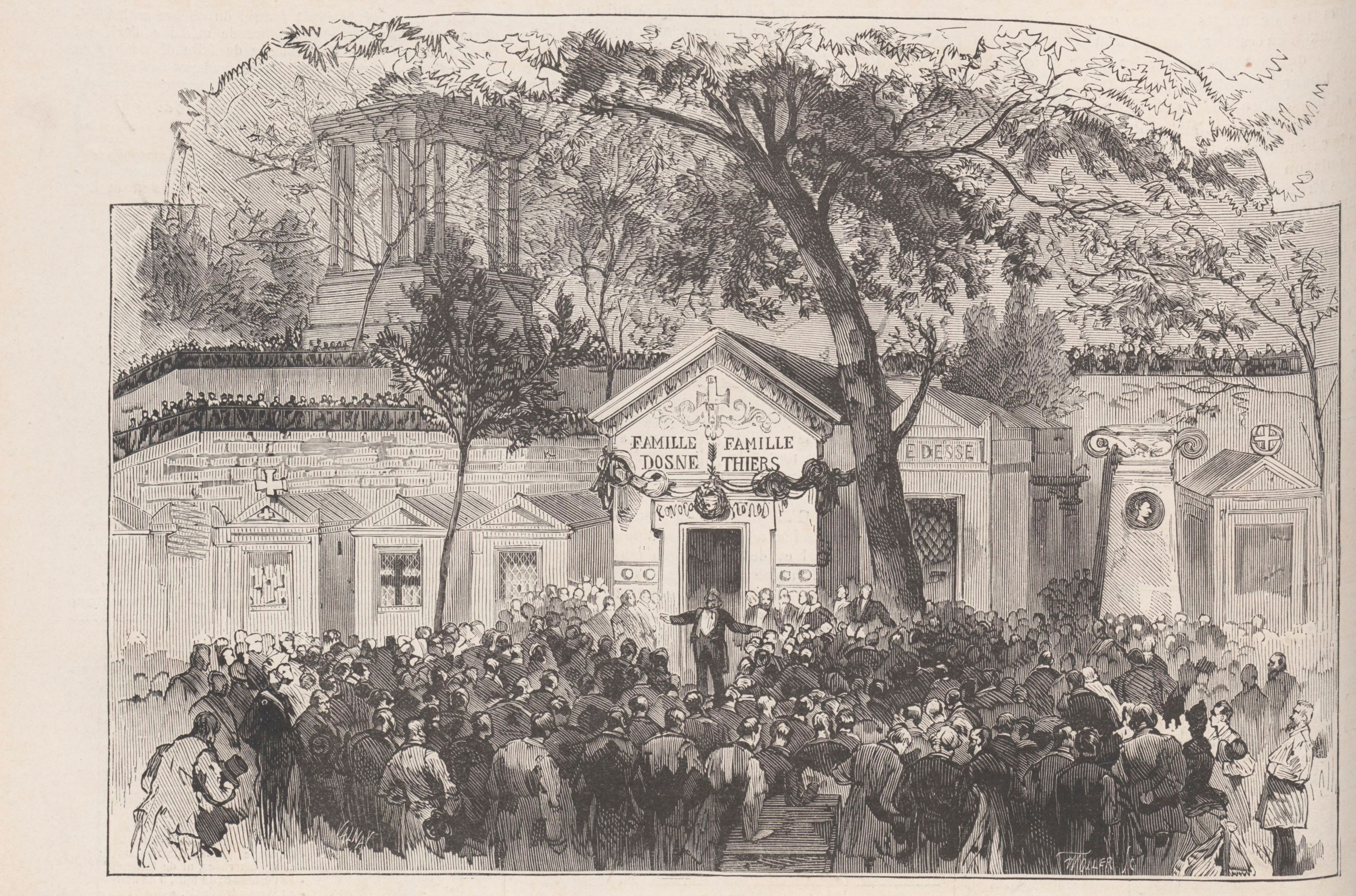 Sépulture de la famille Thiers dont Adolphe Thiers (1797-1877). Monument funéraire de l'architecte Aldrophe, orné d'un relief en marbre représentant le Patriotisme de Chapu et, à l'intérieur, d'une statue représentant l'Immortalité de Mercié. Concession de 152m². Initialement Adolphe Thiers a été enterré dans la chapelle Dosne-Thiers, avenue des Acacias, près de la tombe d'Étienne-Renaud-Augustin Serres.